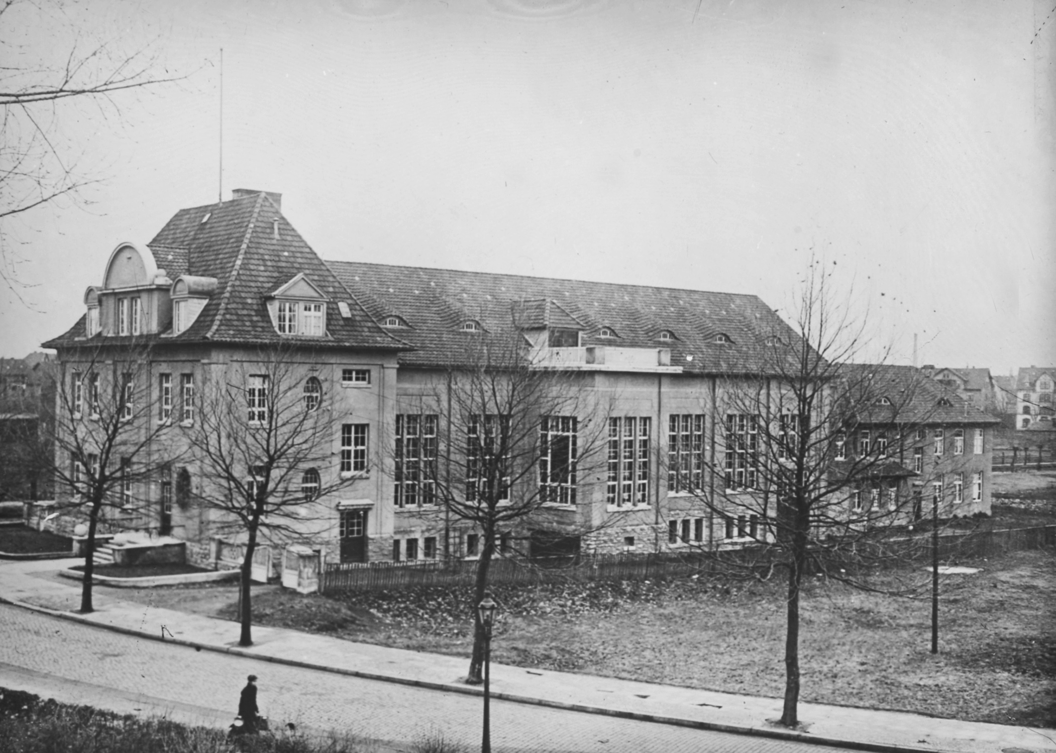 Göttingen, Böttingerstraße: Gesamtansicht der Modellversuchsanstalt für Aerodynamik (MVA) in Göttingen, Haus 1 und 2 von Südosten (1919).